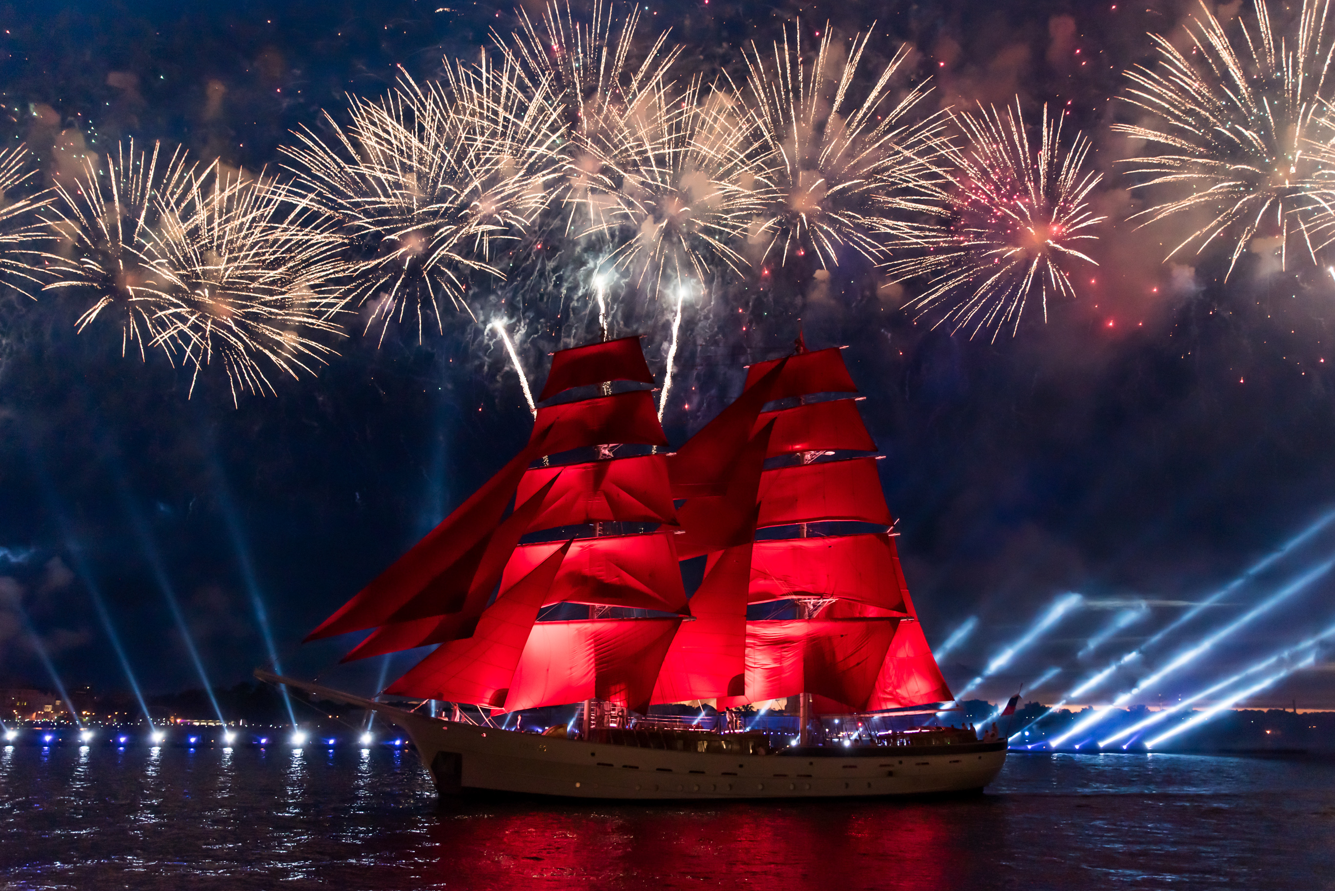 Алые Паруса 2019. Бриг Россия